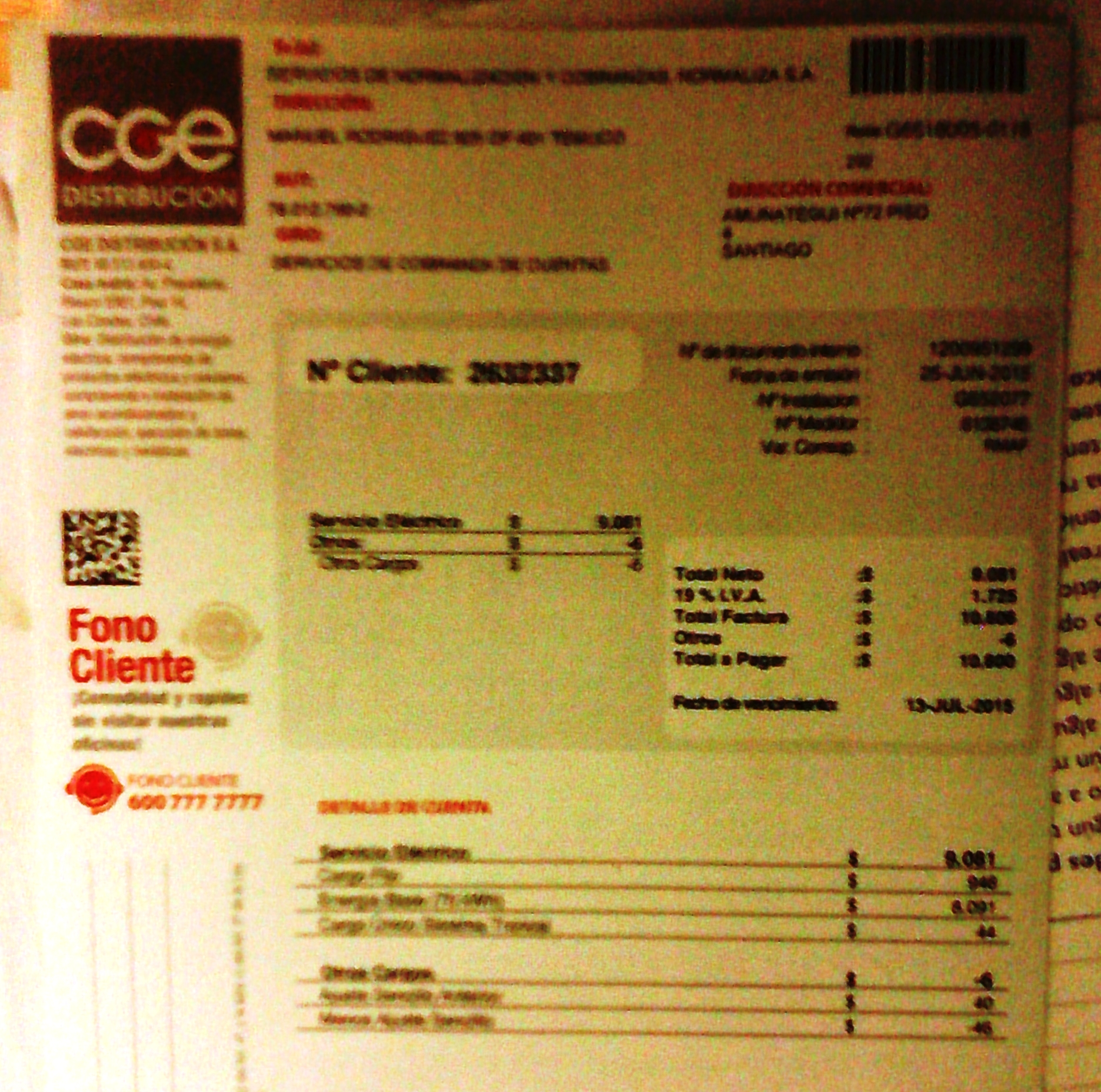 Boleta de la empresa chilena CGE Distribución.